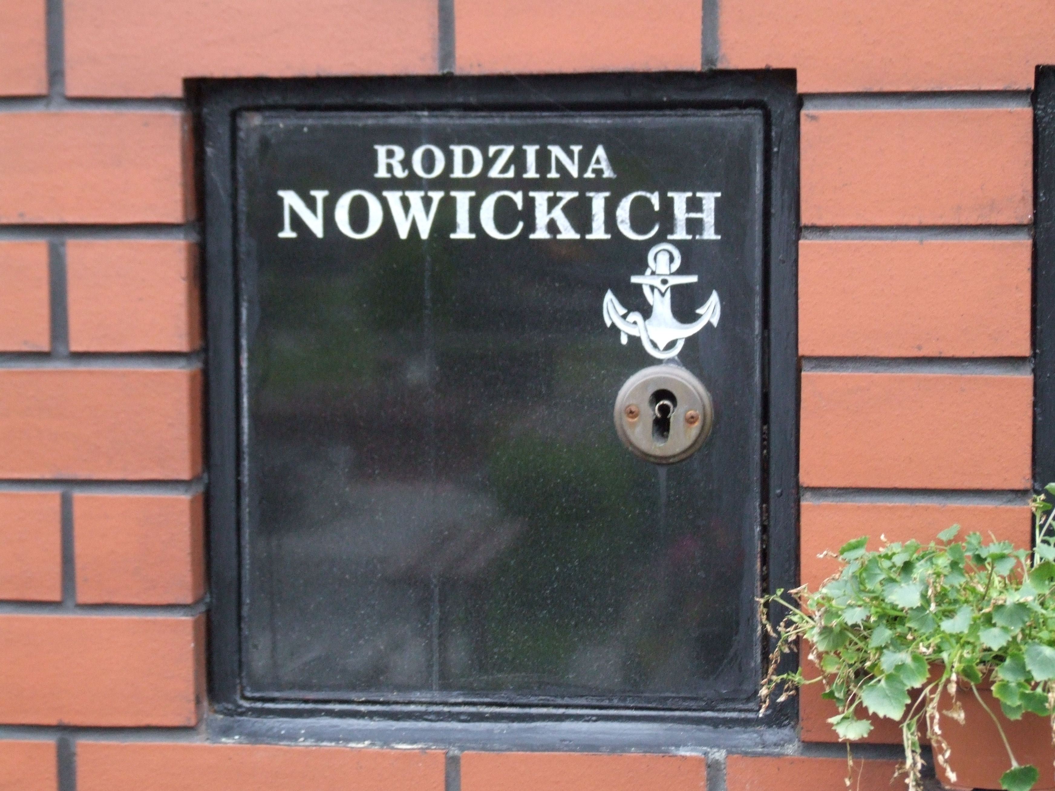 Gdynia-Oksywie Cmentarz Marynarki Wojennej